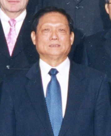 刘淇，中共中央政治局委员、北京市委书记，摄于2012年